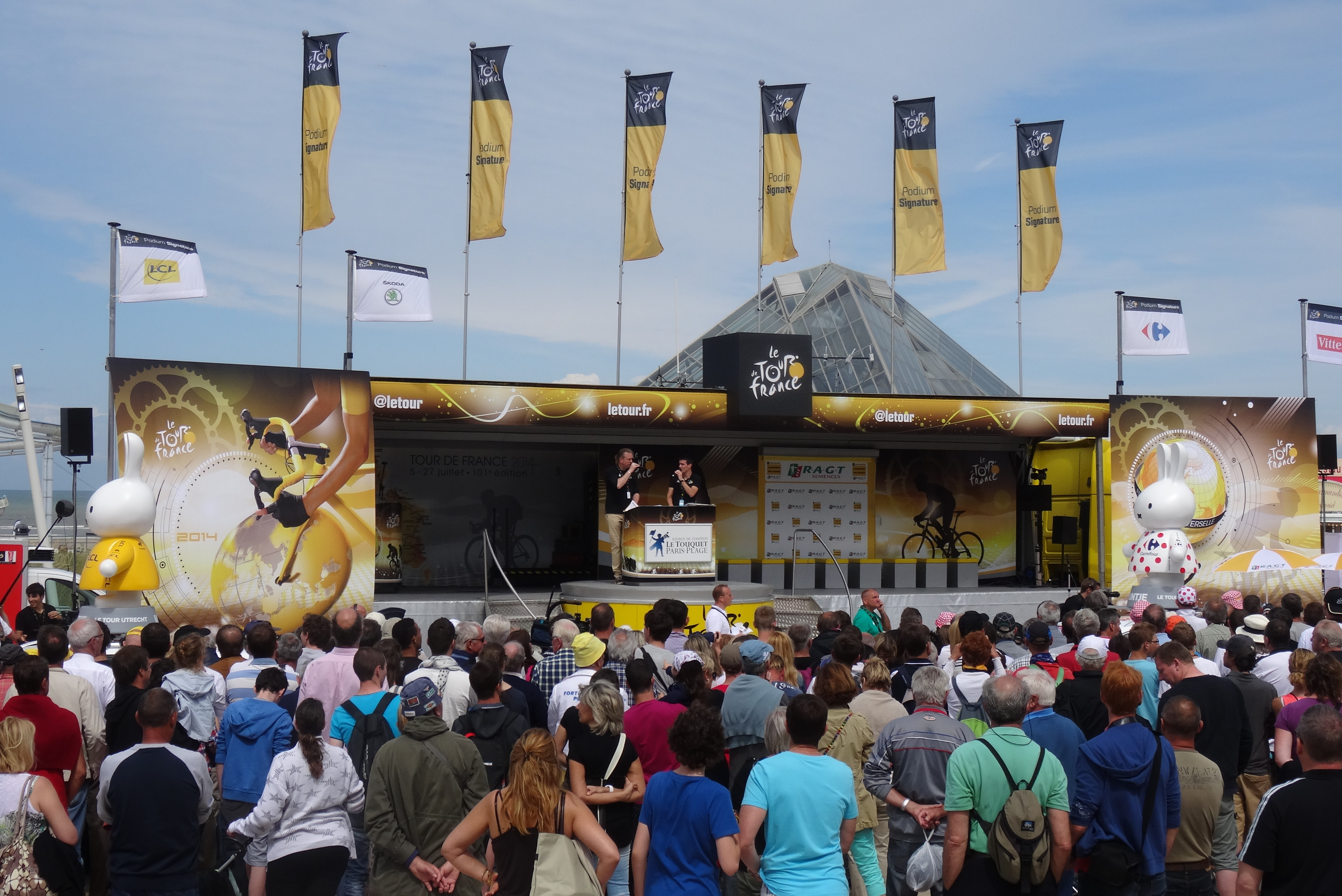 Reportage photographique réalisé le mardi 8 juillet à l'occasion du départ de la quatrième étape du Tour de France 2014 au Touquet-Paris-Plage, Nord-Pas-de-Calais, France.